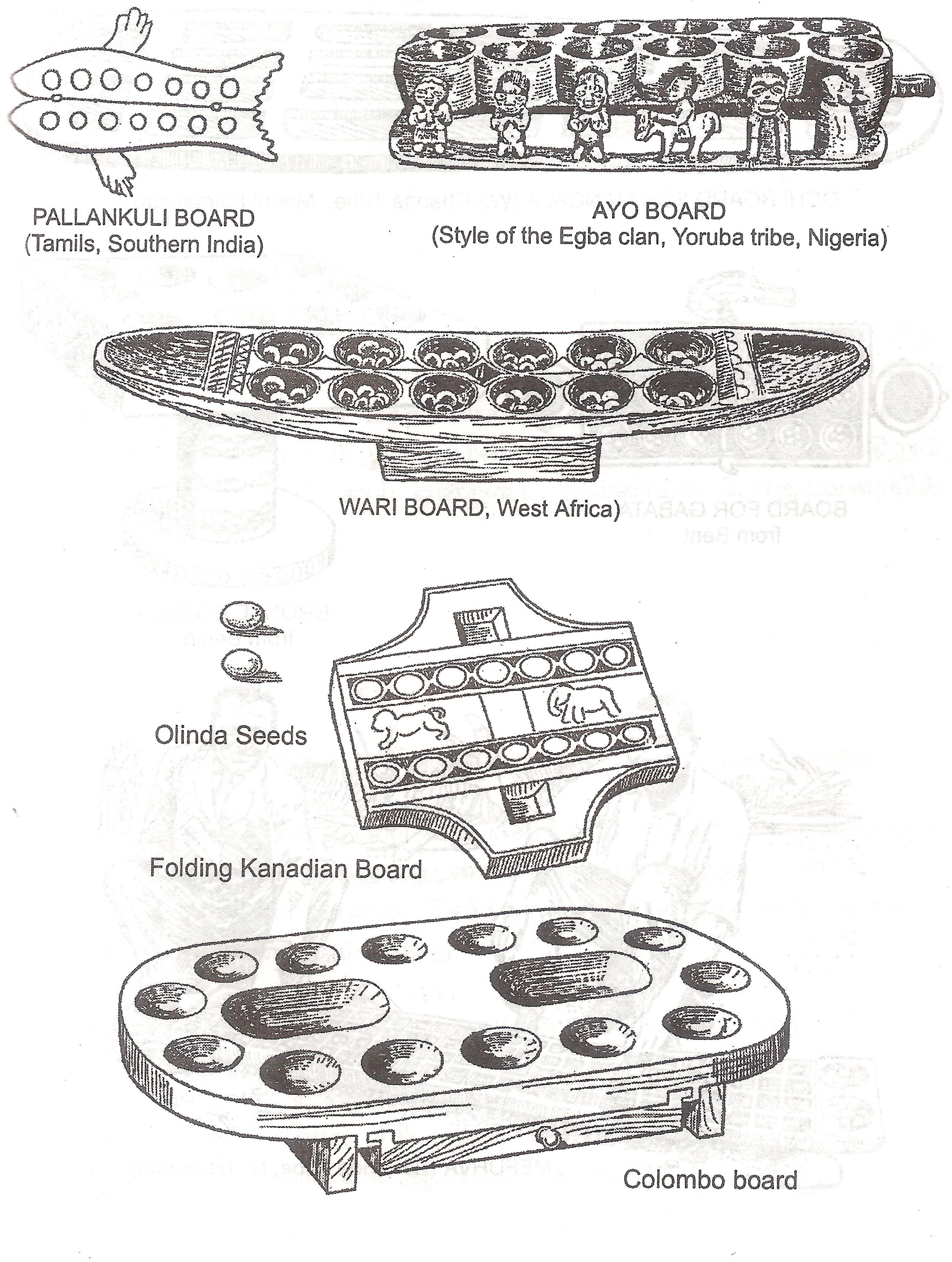 Game “Pallanguzi, பல்லாங்குழி, a board game, was played all over the world, in various boards, in various patterns. The image was taken from my own source, a book written by me, Vanishing-Game , Maraikindra Vilaiyaattugal. மறைகின்ற விளையாடுகள், 2002